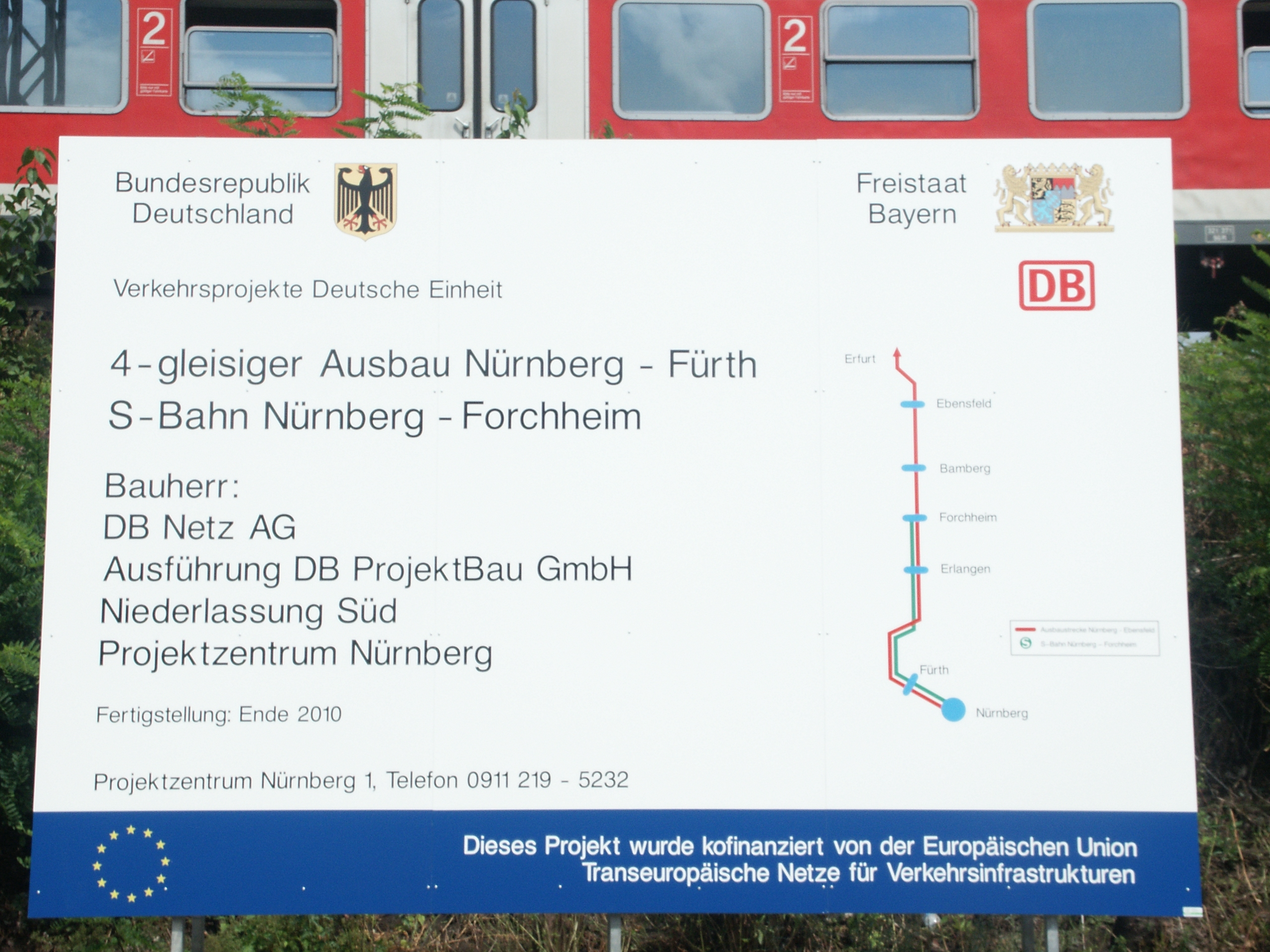 Bauschild S-Bahn Forchheim